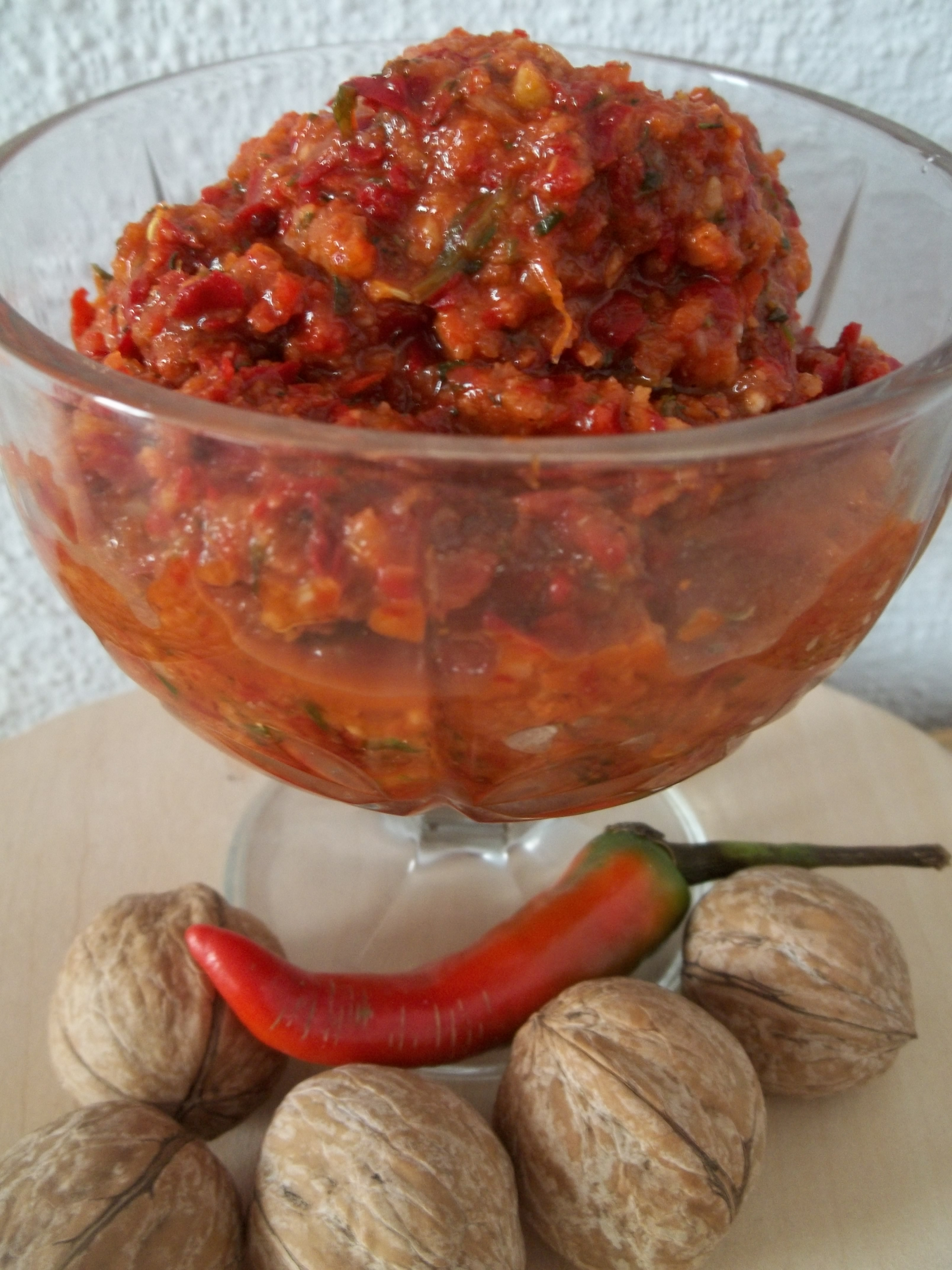 Аджика с грецкими орехами и красным перцем